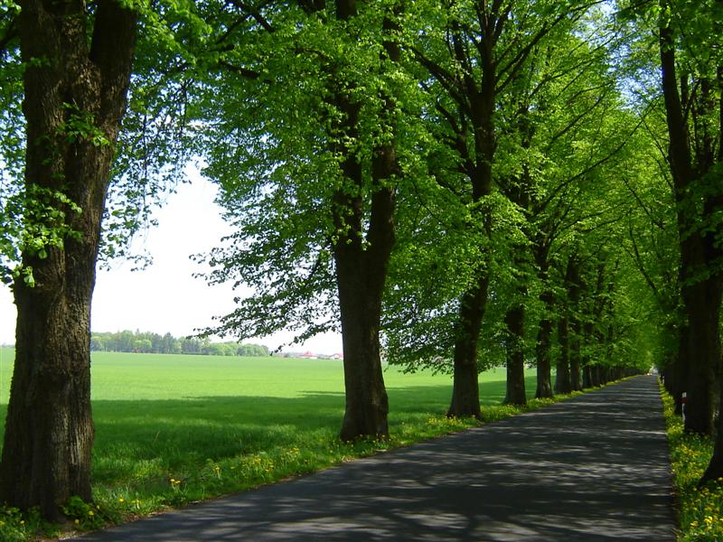 Aleja lipowa między Tychowem a Trzebiszynem w Gminie Tychowo.